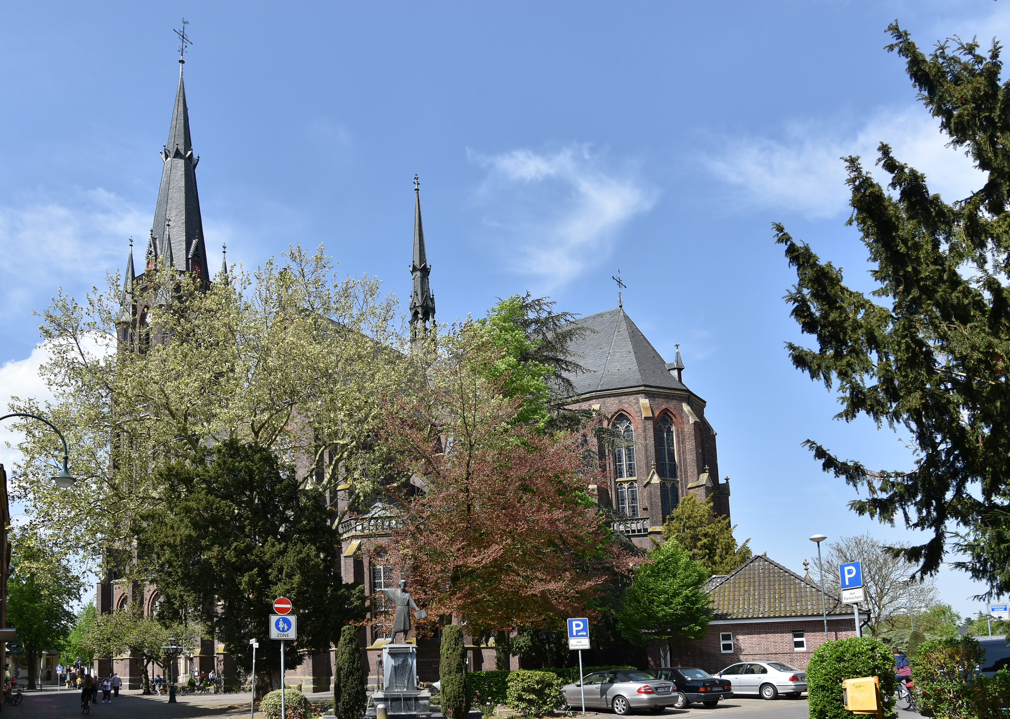 Mariabasiliek Kevelaer 24-04-2019 12-44-27